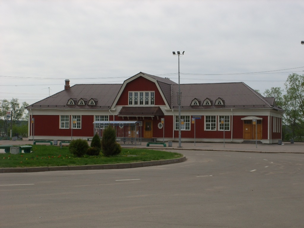 Вокзал ст. Приозерск со стороны города весной